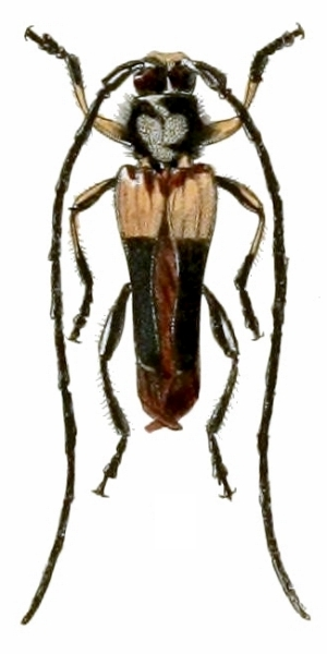 Ilustração do macho de Akiptera waterhousei (Pascoe, 1864)